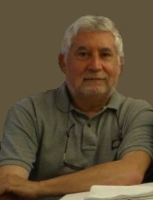 Gustau Muñoz Veiga